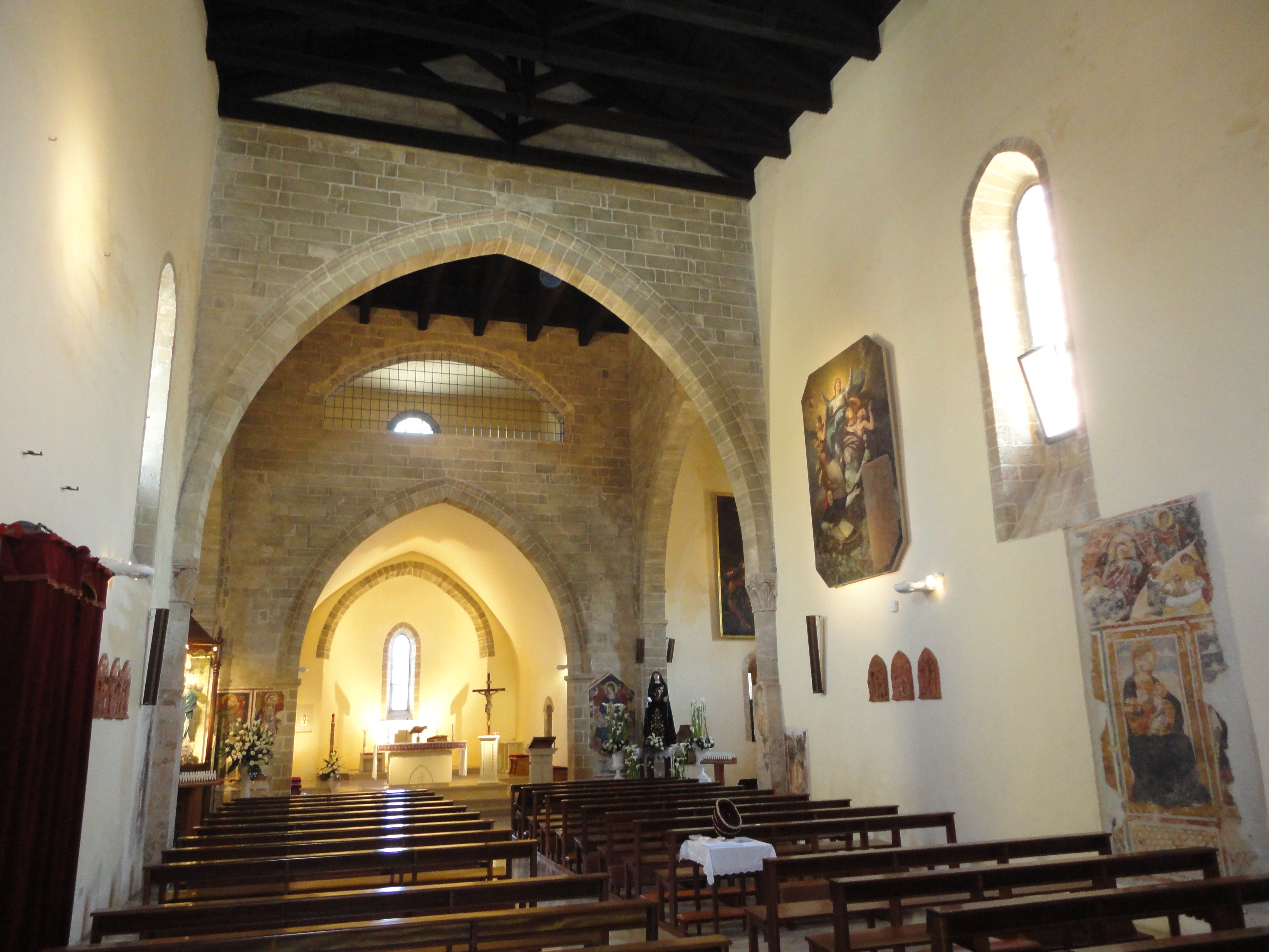 Interno della Lizza Alezio, Lecce